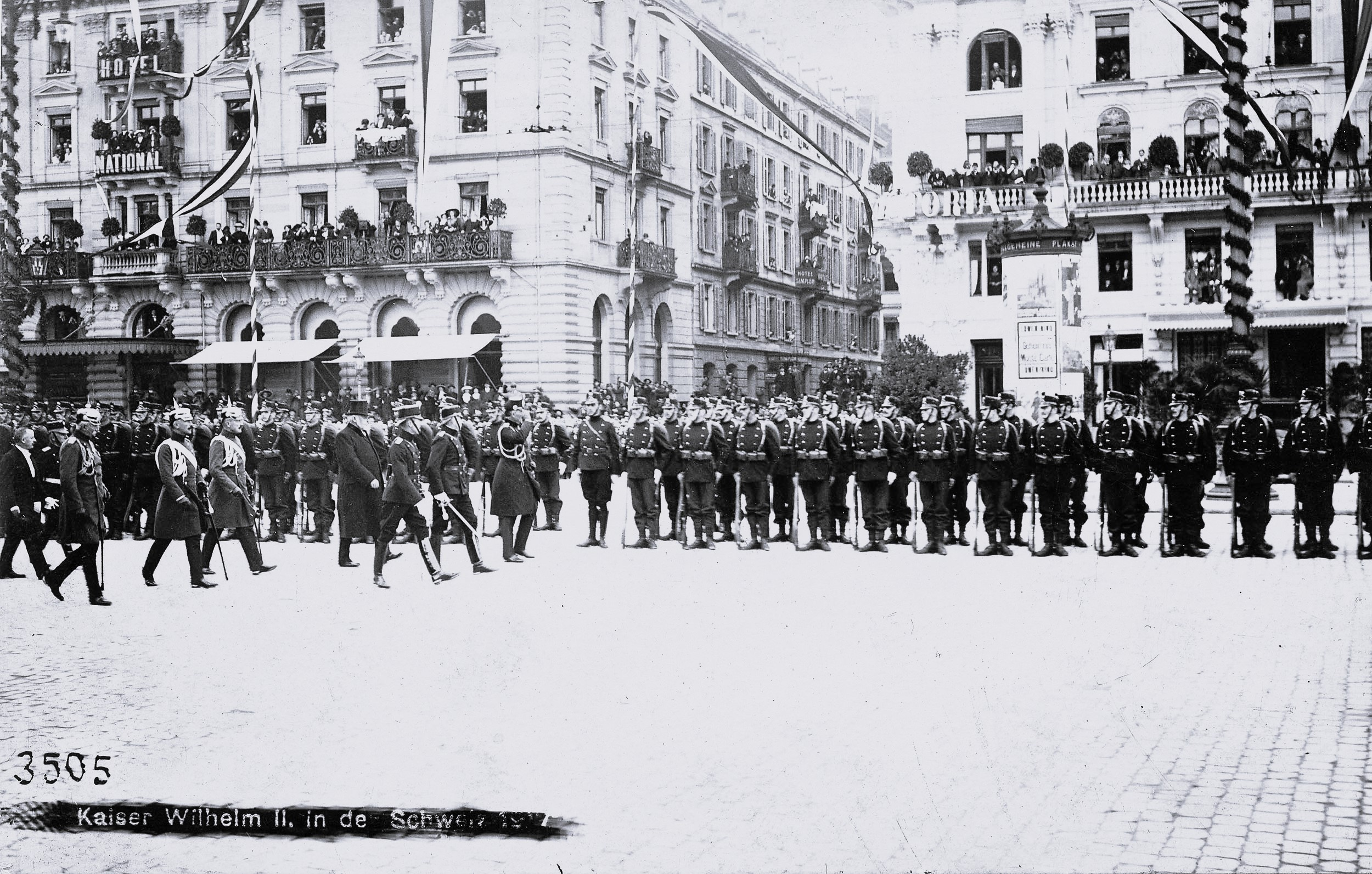 Kaisermanöver 1912, Empfang durch Gebirgschützenbataillon 6, Zürich, Schweiz